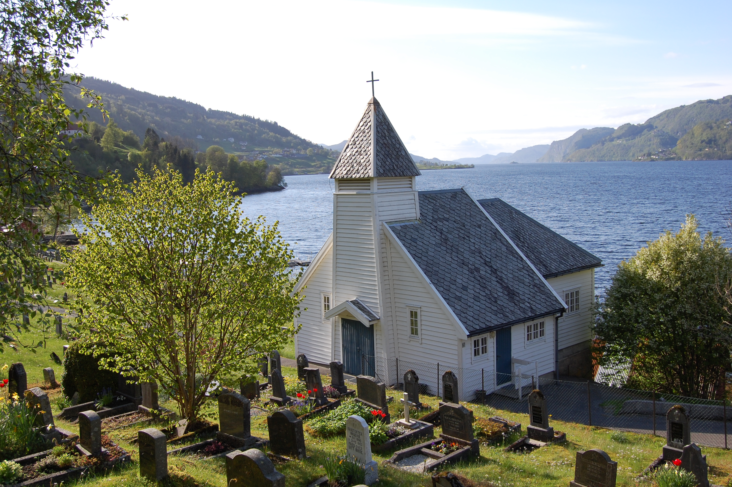 Takvam kapell.